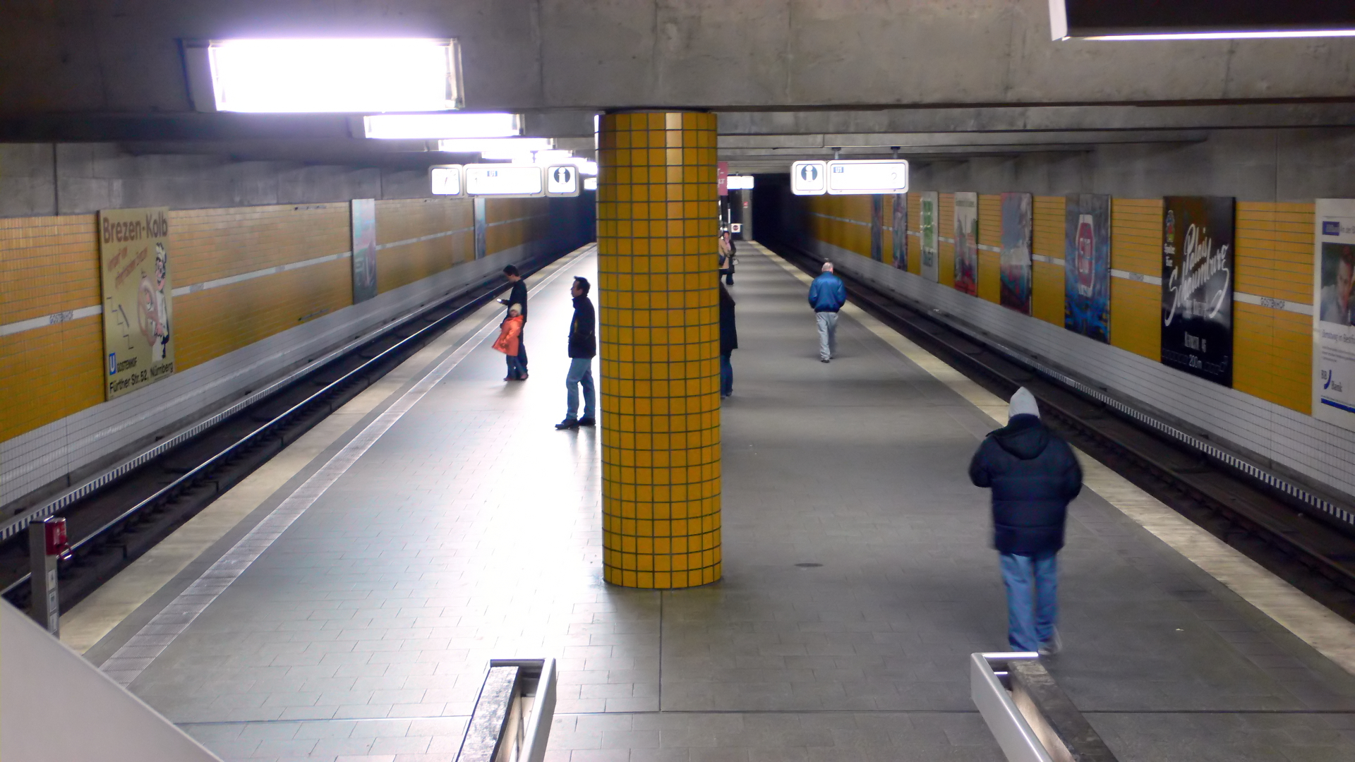 U-Bahnhof Gostenhof der U-Bahn Nürnberg, Bahnsteigebene, Blick von Westen